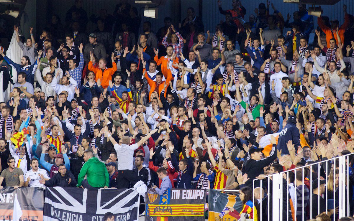 Aficionats, probablement de la Corba Nord, del València CF en Mestalla.